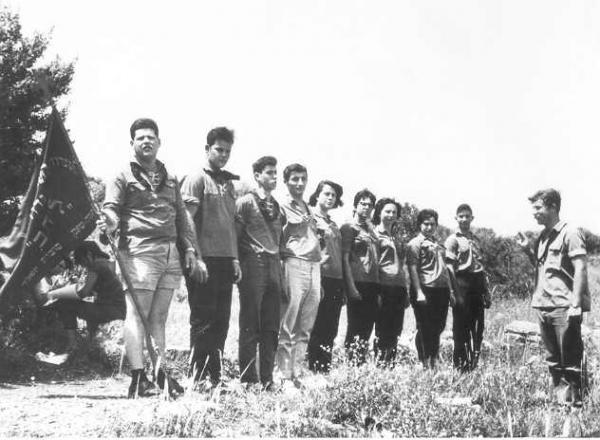 מפקד בעת פעולה בתנועה